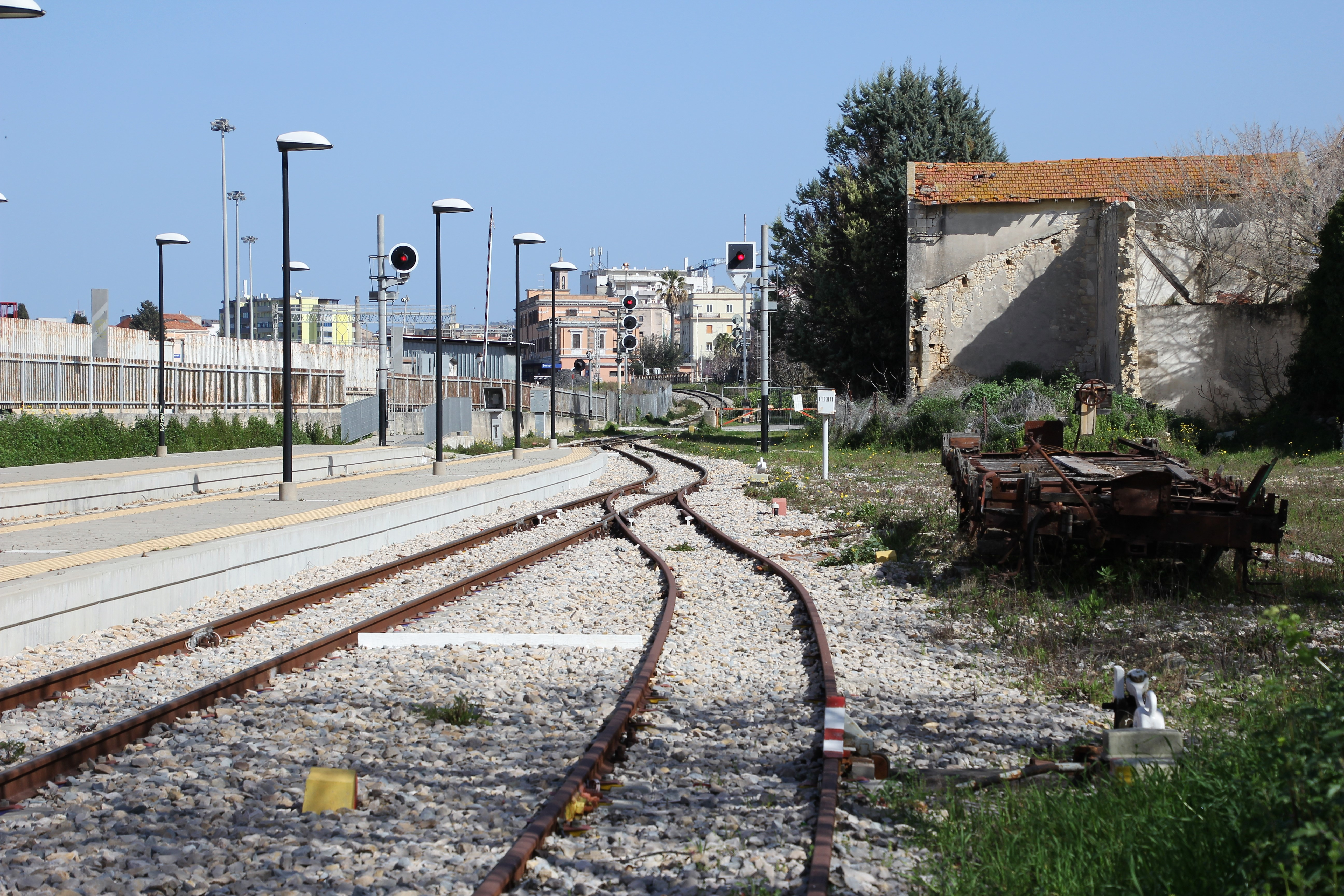 Sassari, stazione ferroviaria di Sassari Santa Maria